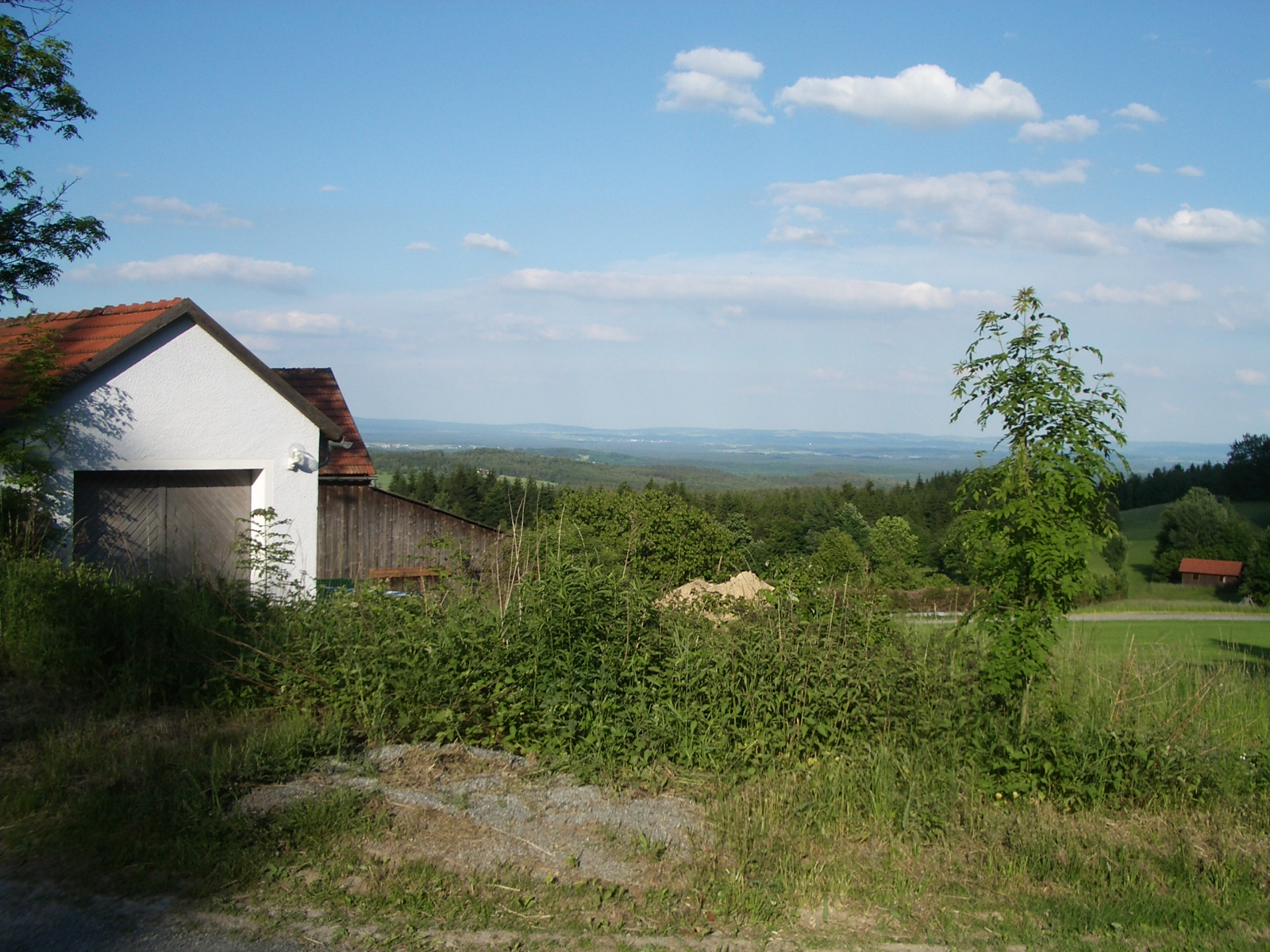 Blick vom Wanderparkplatz Pfaben